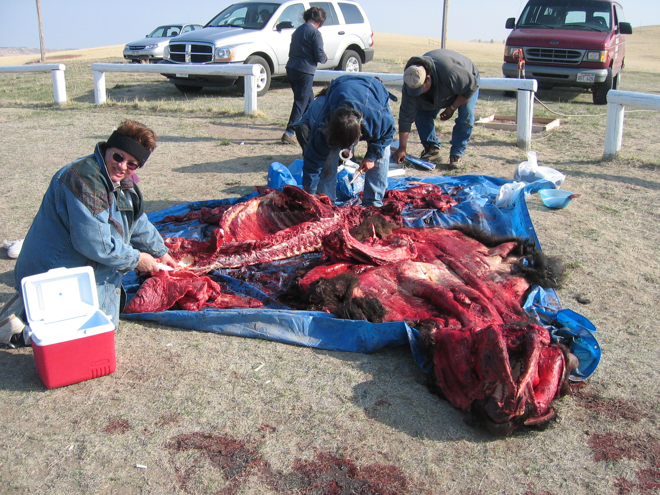 Dépeçage d’un bison pour les enfants du collège de Wanbli, Pine Ridge, South-Dakota, USA Il ne restera que les os, l'estomac, la vessie ont été récupérés pour en faire des objets traditionnels